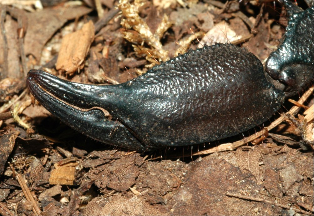 Hadogenes paucidens Pocock, 1896, Scorpiones, Hemiscorpiidae.